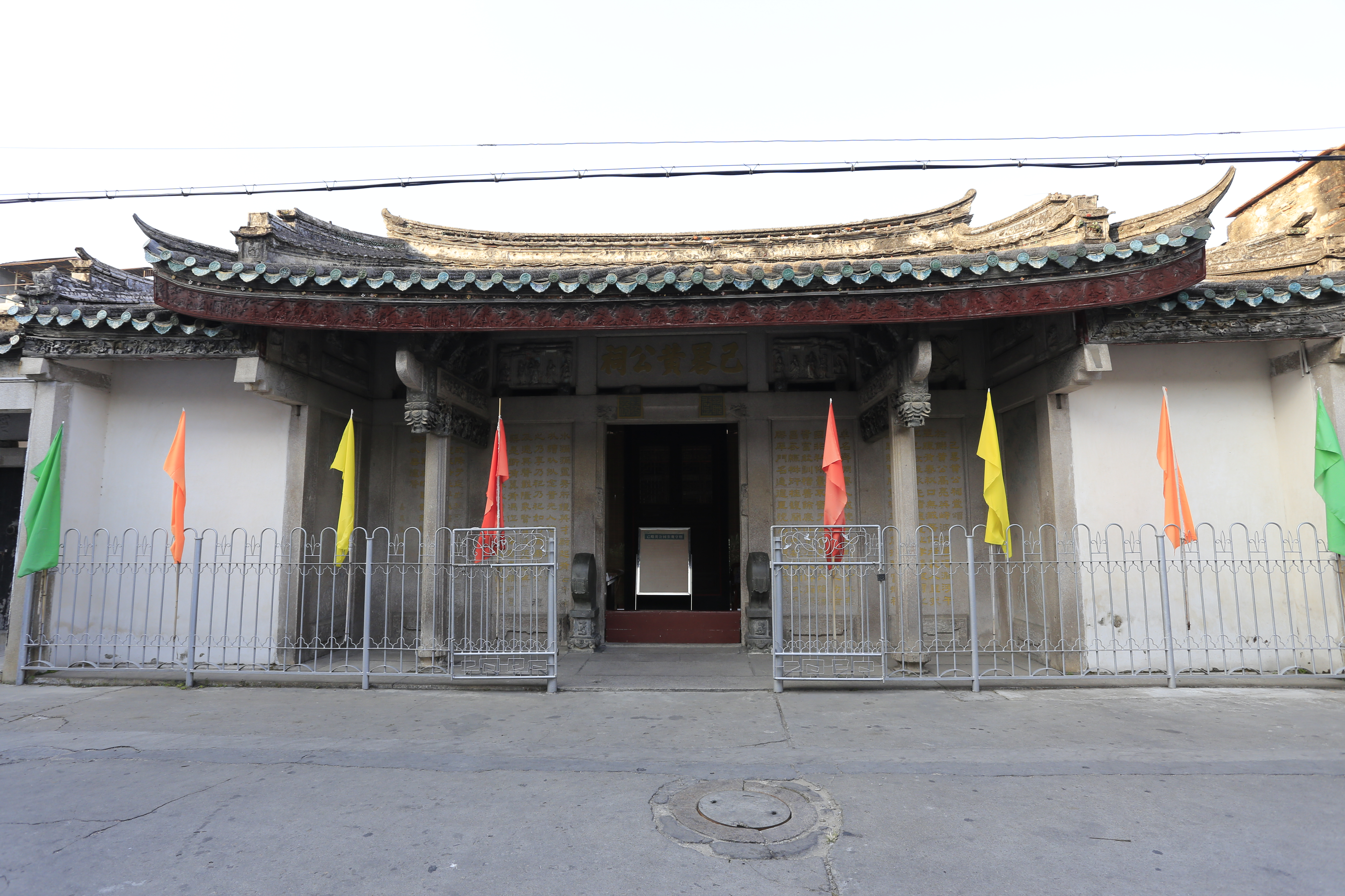 潮州已略黄公祠